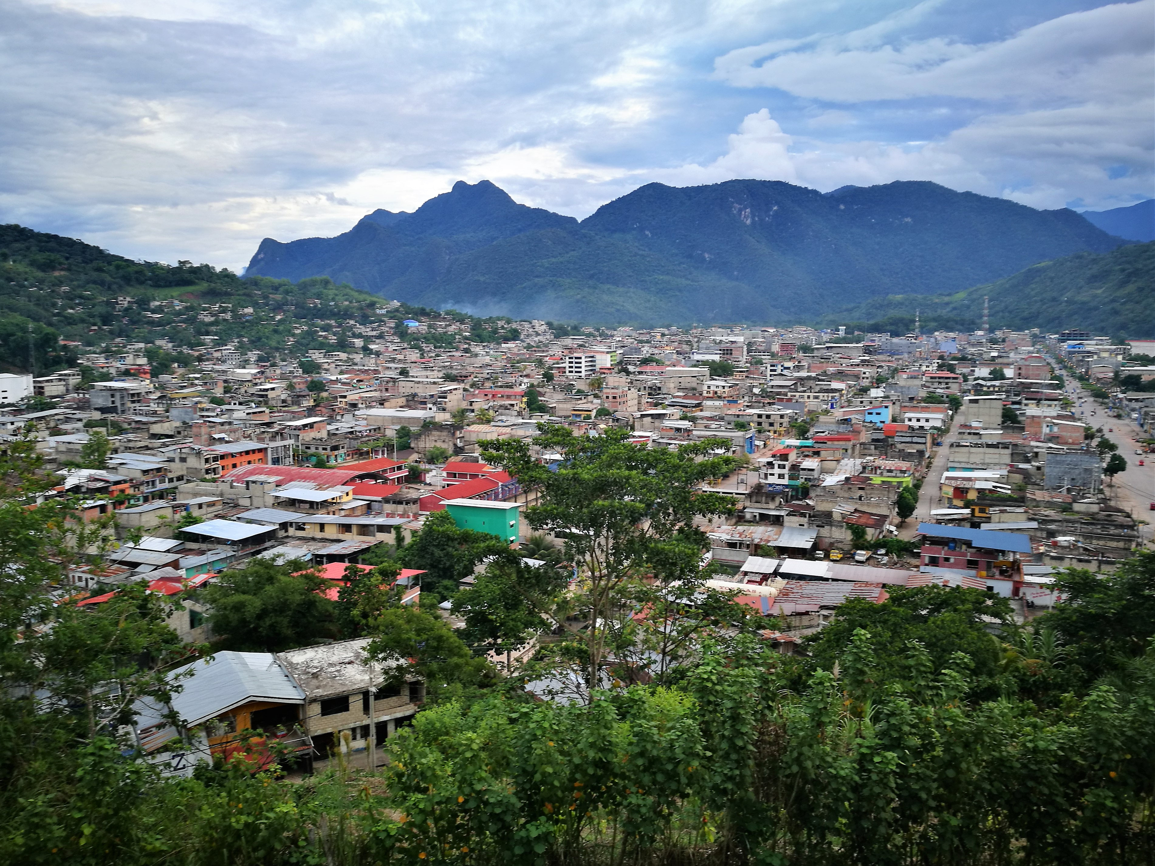 Vistes des del Mirador de la Cruz de Tingo María